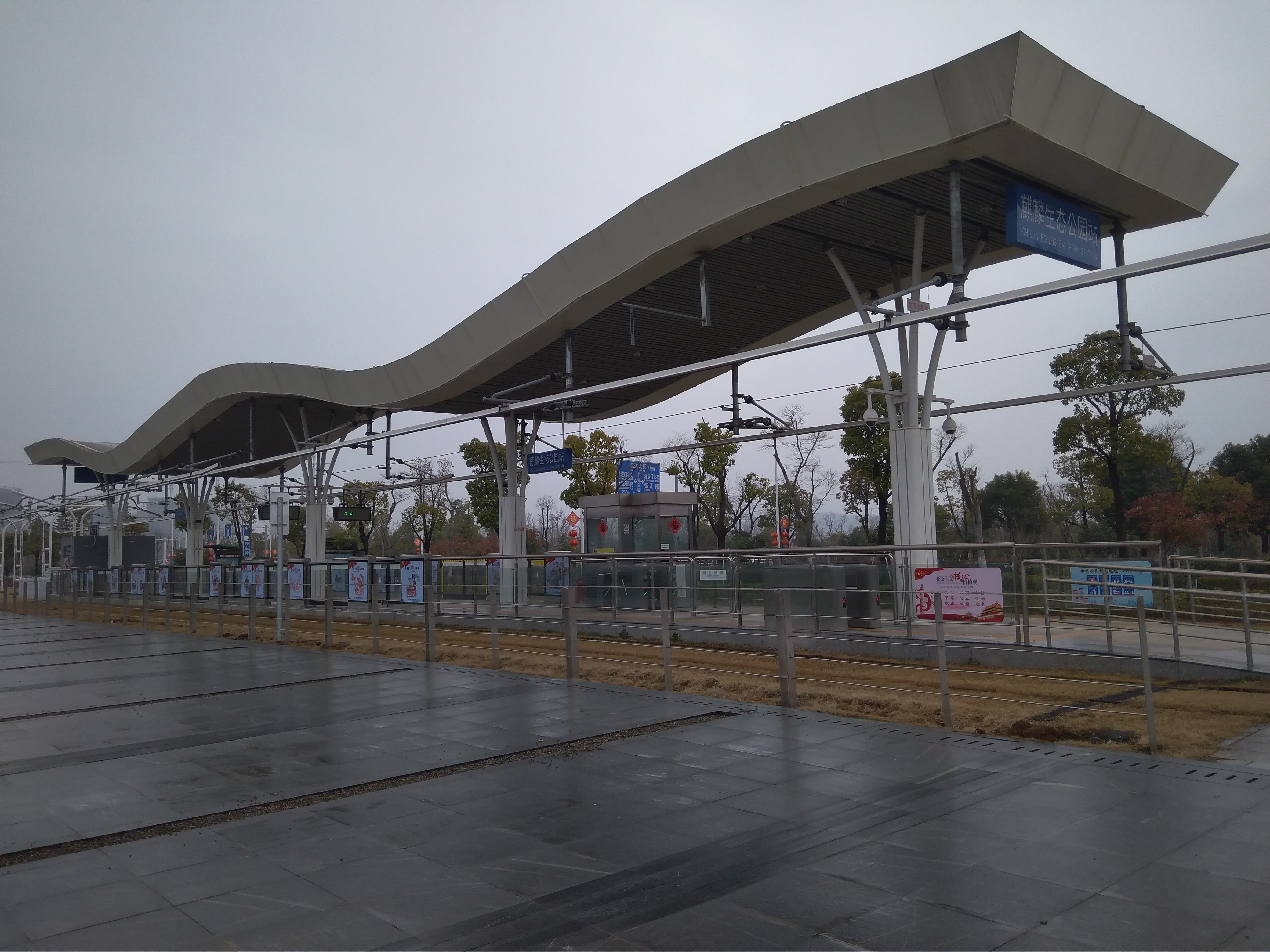 南京麒麟有轨电车麒麟生态公园站